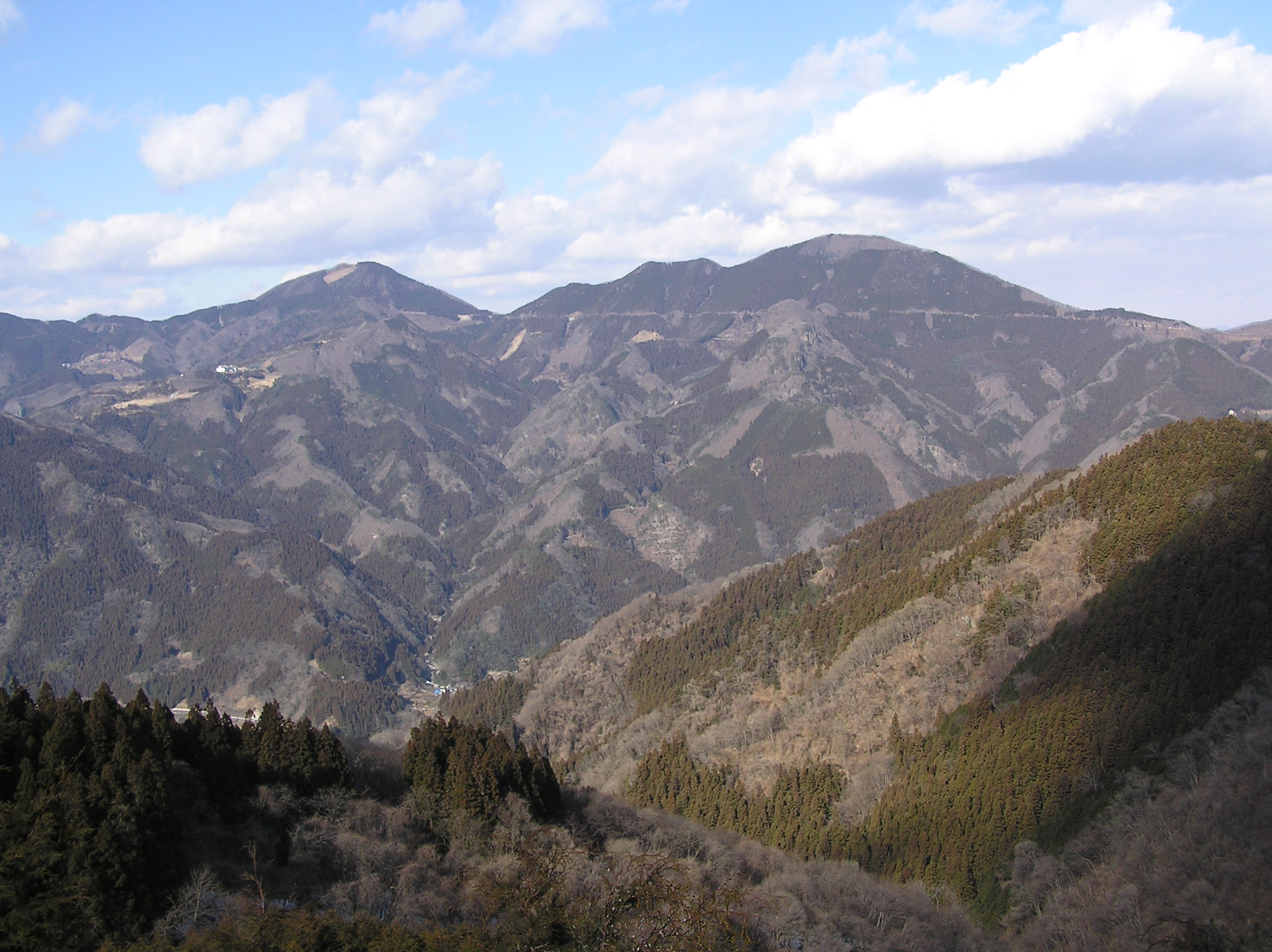 御荷鉾山を南南東から望む。西御荷鉾山 (左) と東御荷鉾山 (右) 。